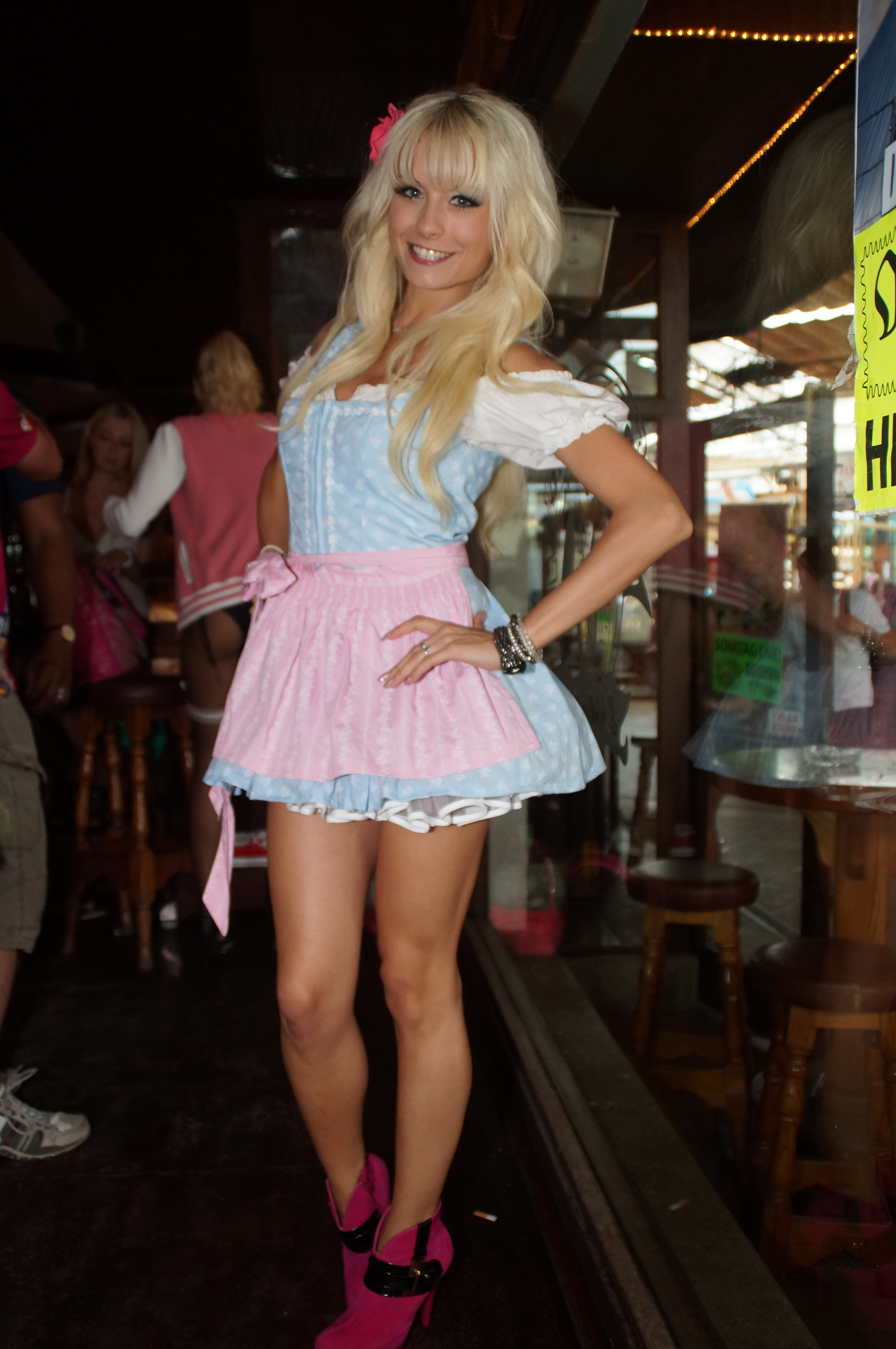 Mia Julia Brückner bekannt auch als Mia Magma im Bierkönig am Ballermann auf Mallorca